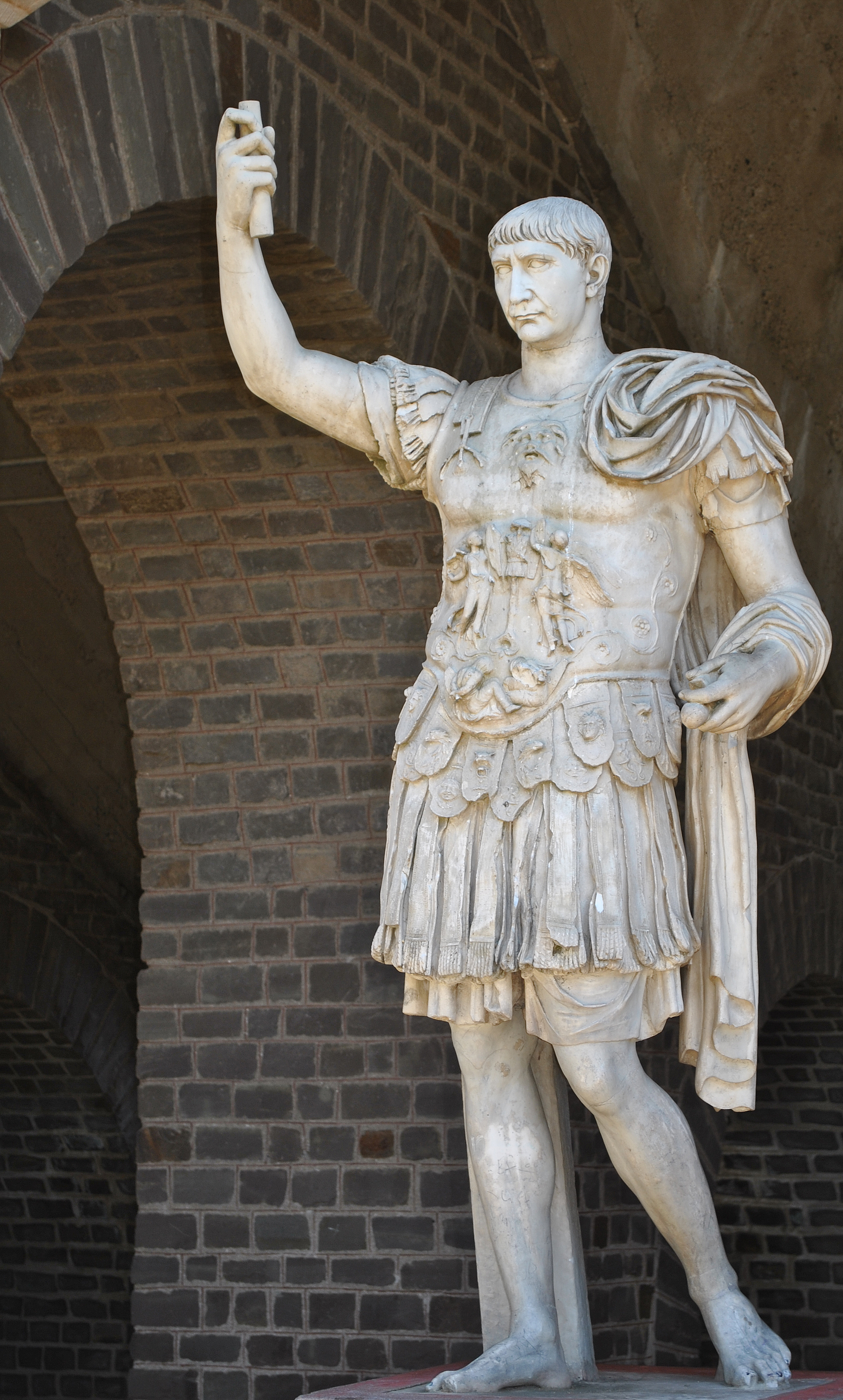 Statue des Trajan vor dem Amphitheater der Colonia Ulpia Traiana im Archäologischen Park Xanten